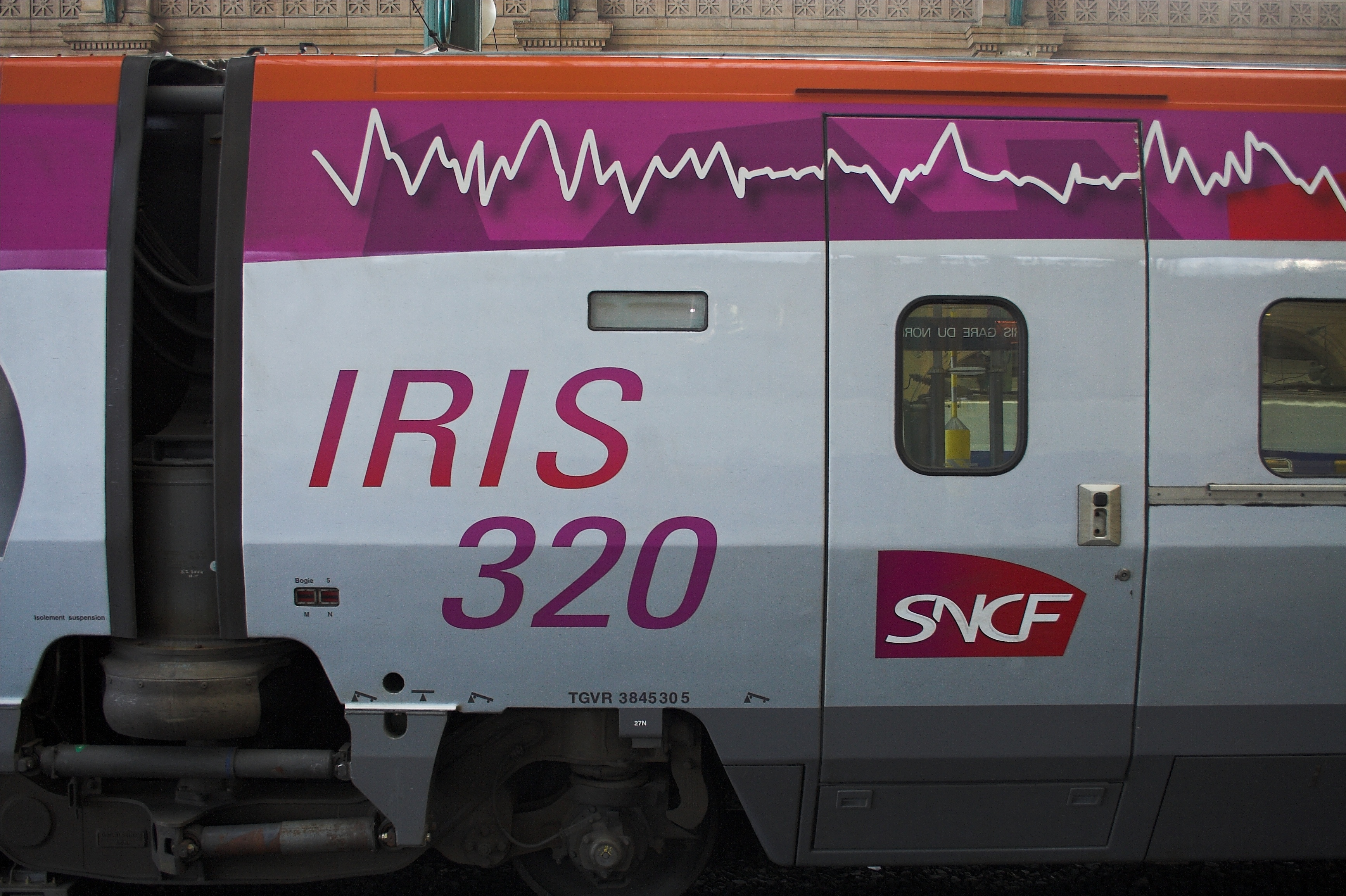 IRIS 320 (Gare du Nord, France)